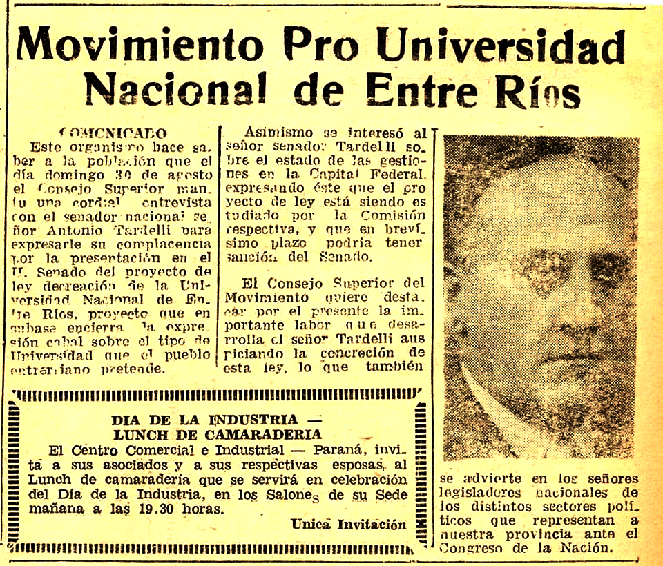 Información sobre el proyecto de creación de la Universidad Nacional de Entre Ríos, diario "La Acción".